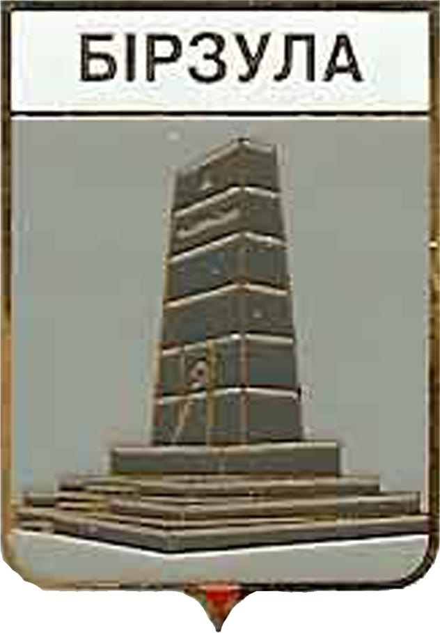 Герб міста Бірзула